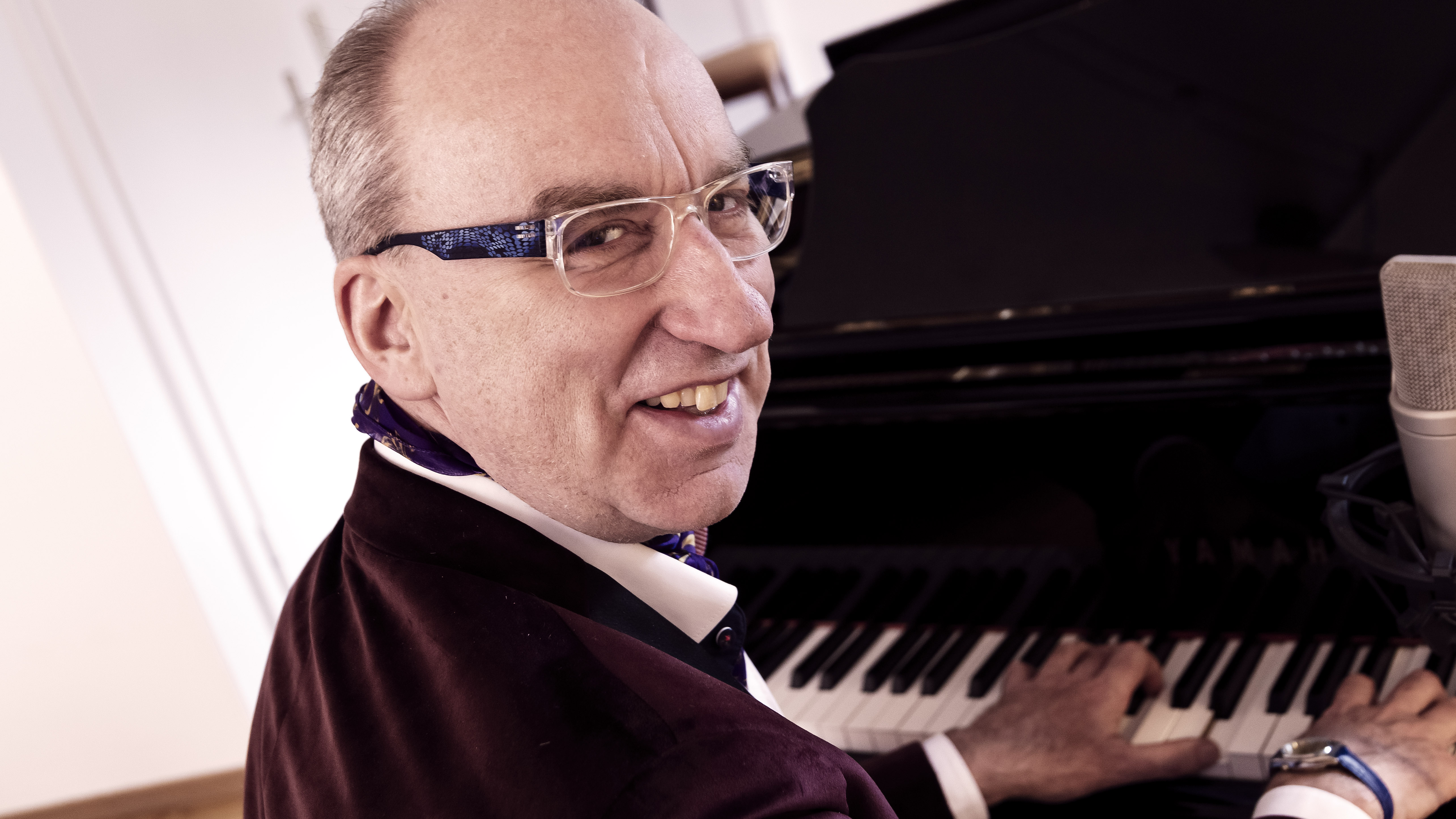 Konzertfoto Thomas Gerdiken Osnabrückhalle 2020